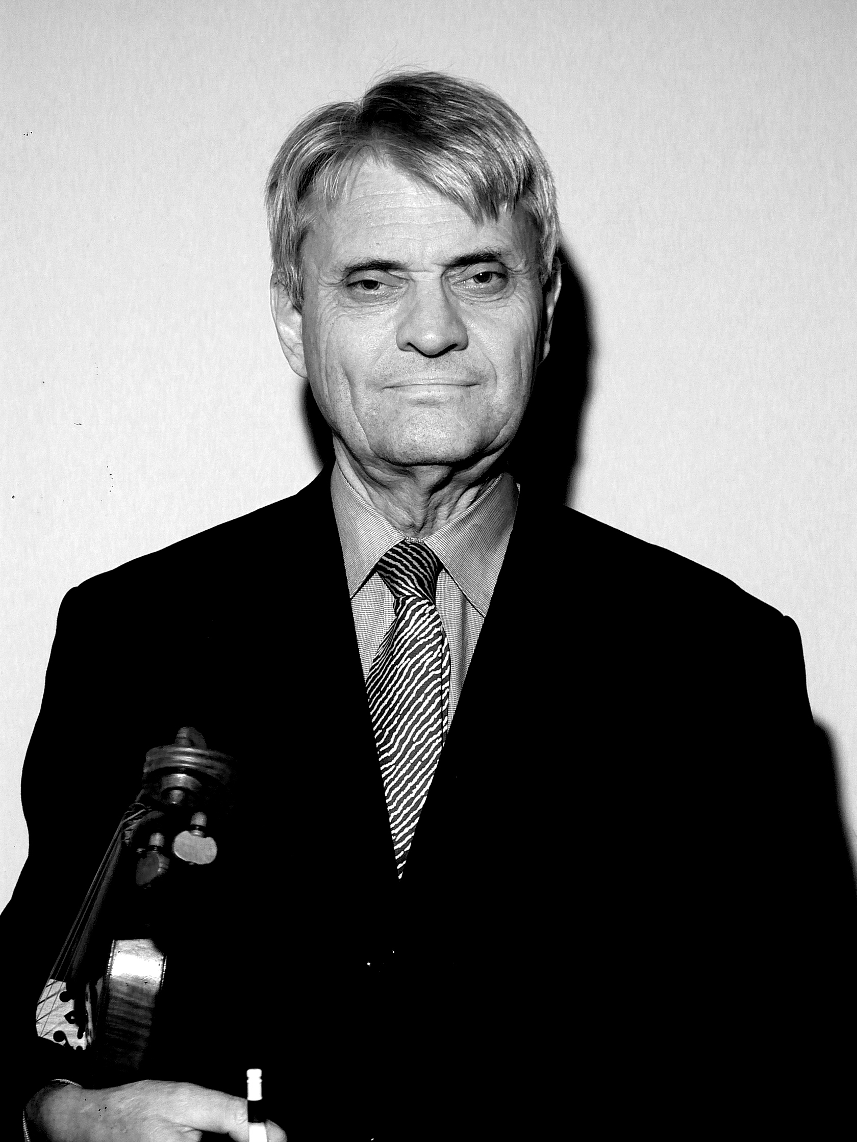 Künstlerporträt entstanden in der Nicolai-Kirche Gelsenkirchen